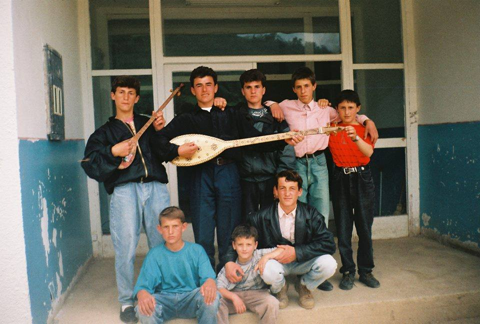 Nxenesit e shkolles fillore ``Mihal Grameno`` ne Breze